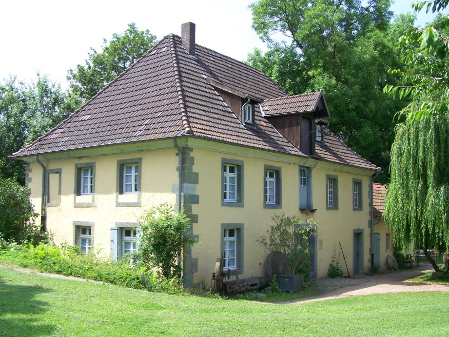 Die Schäferkämper Wassermühle in Bad Westernkotten. Sie wurde 1991 bis 1994 von den Heimatfreunden Bad Westernkotten e.V. mit Unterstützung der NRW-Stiftung restauriert, 1994 wiedereröffnet und wird seitdem als technisches Kulturdenkmal betrieben.